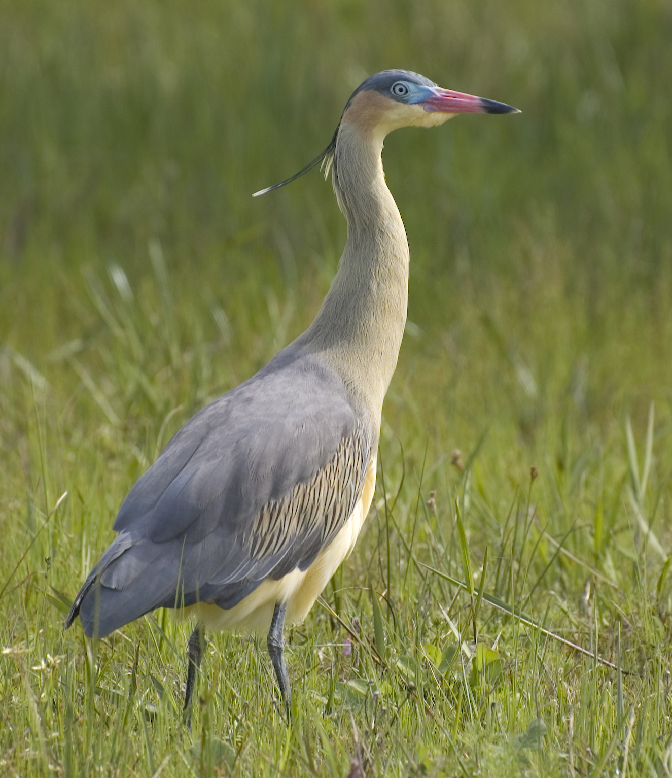 CHIFLON_O_GARZA_AMARILLA_Syrigma_sylbilatrix